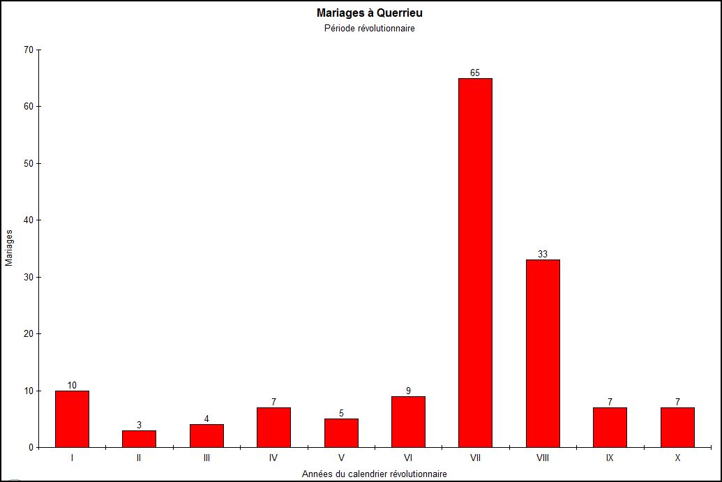 Graphique montrant l'augmentation du nombre des mariages au cours des années VII et VIII de la République.